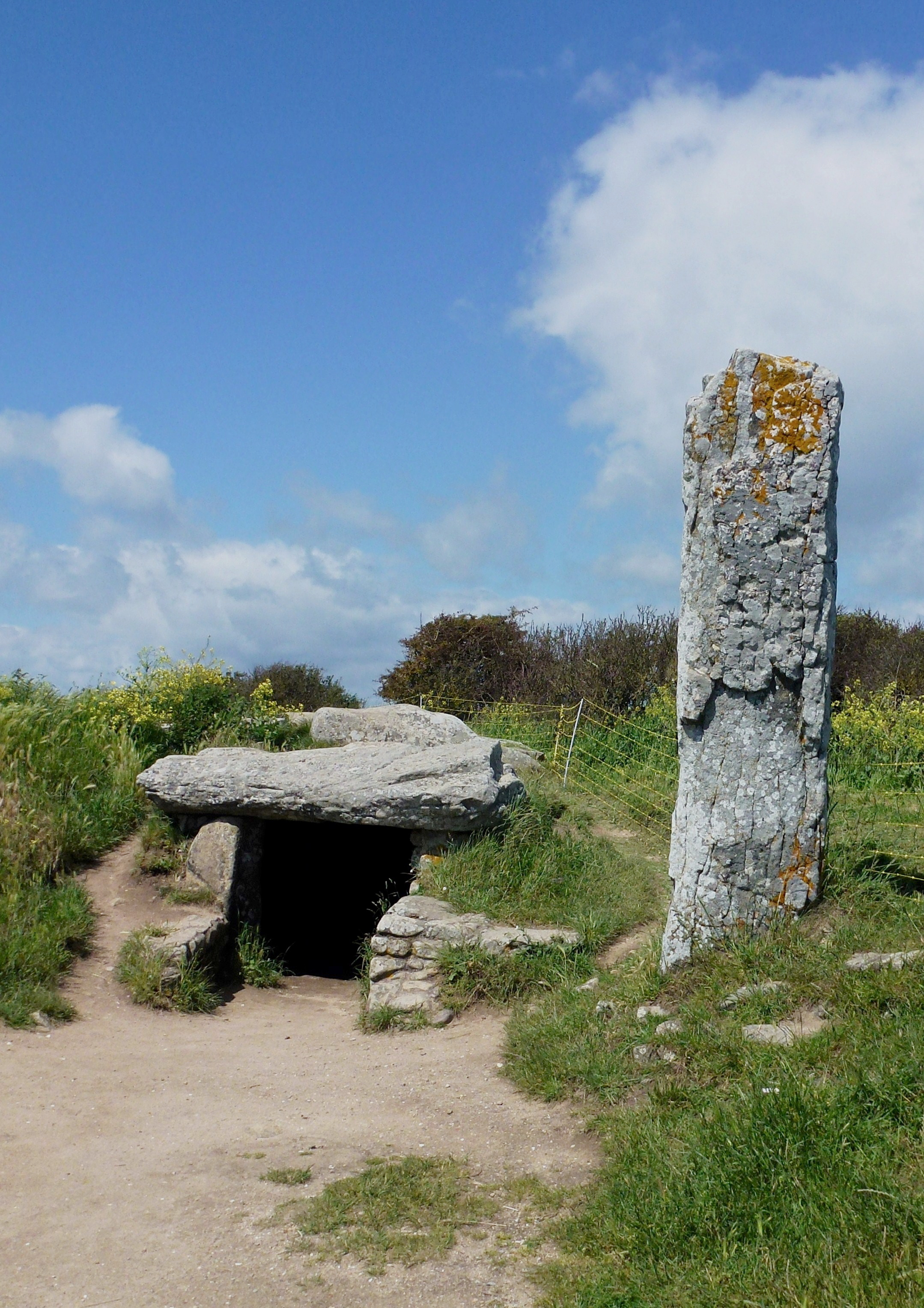 Les Pierres Plates à Locmariaquer, Parc naturel régional du Golfe du Morbihan.- Golfe du Morbihan